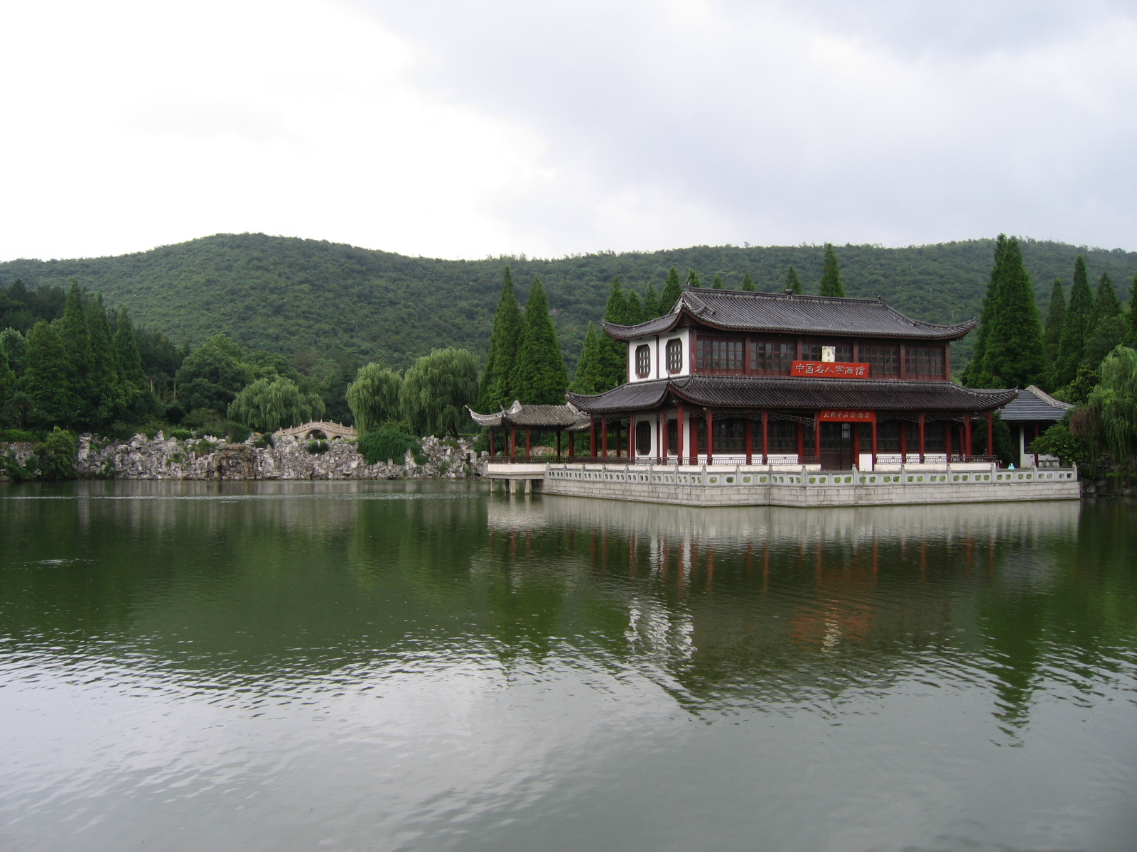 广德太极洞外景 Taiji Cave, Anhui, China